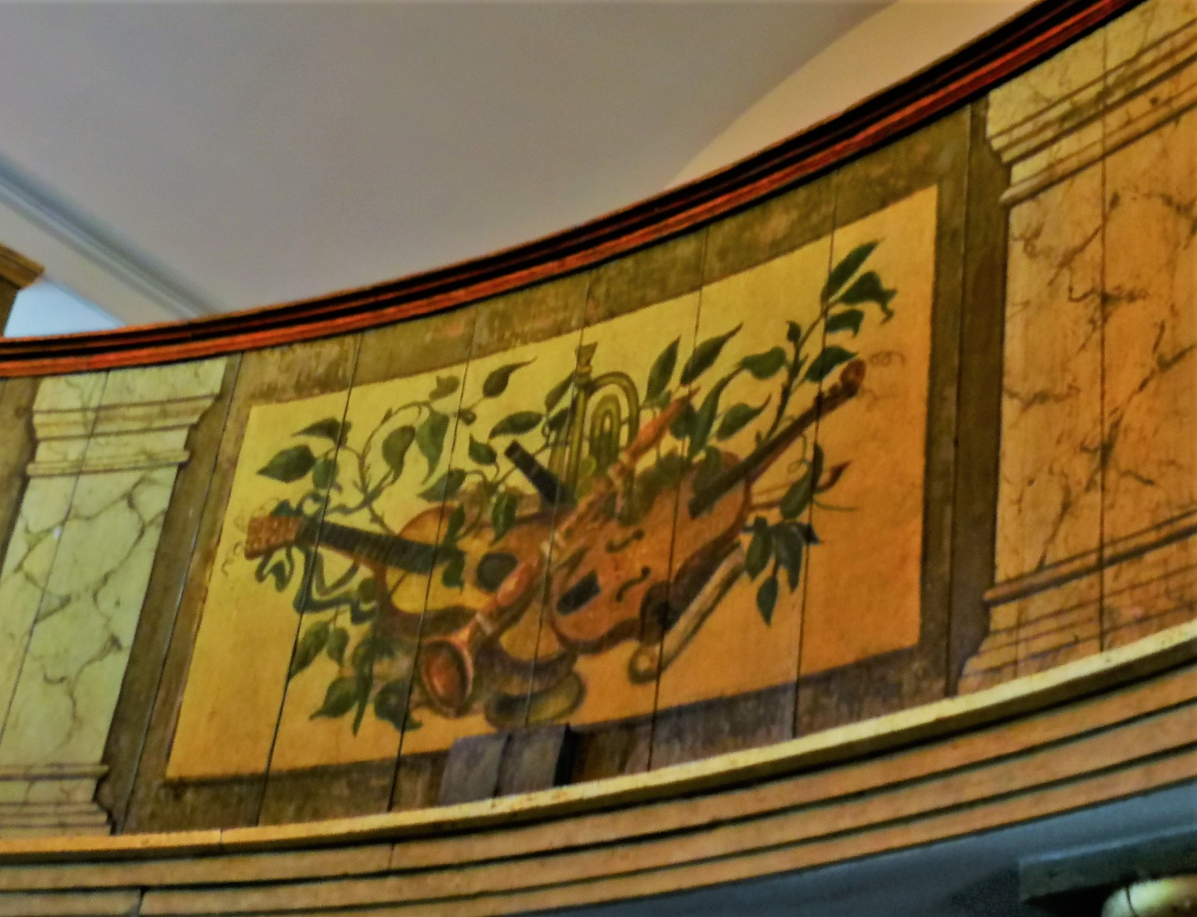 Balkonpanel i Helsingør Teater